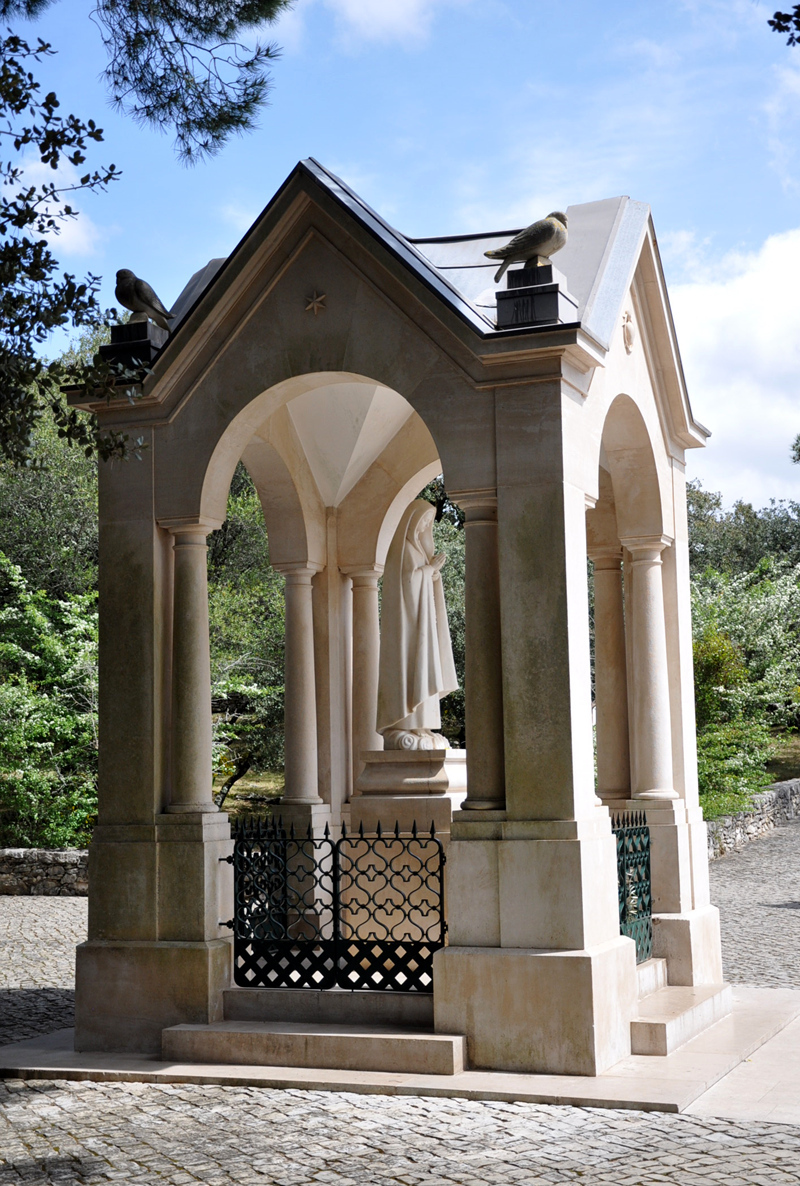 Calváro Hungaro Fatima 0595